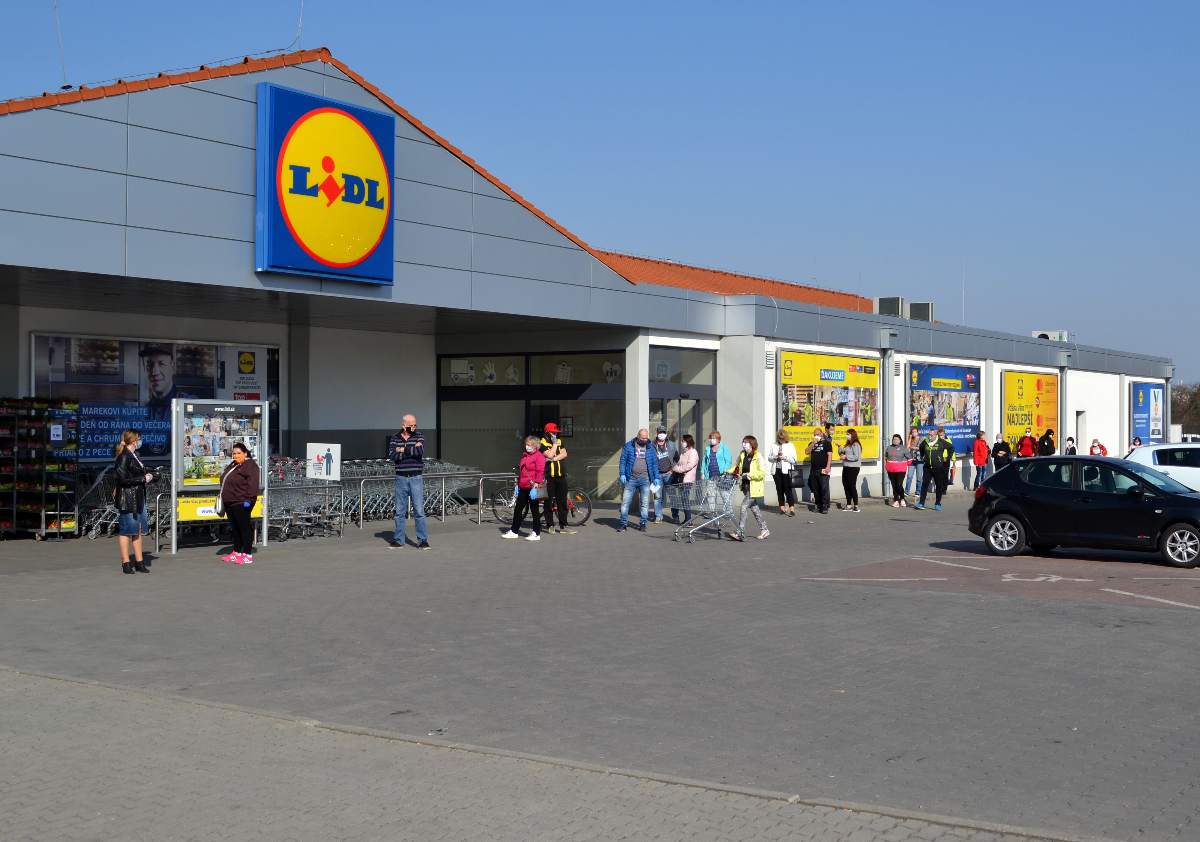 Lučenec, predajňa potravín Lídl, ľudia s ochrannými rúškami na tvárach z dôvodu šíriaceho sa koronavírusu.